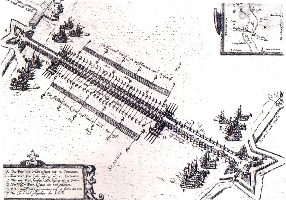 Esquema del Puente de A.Farnesio durante el asedio de amberes Schipbrug over de Schelde bij Antwerpen Floating bridge over the Schelde near Antwerp